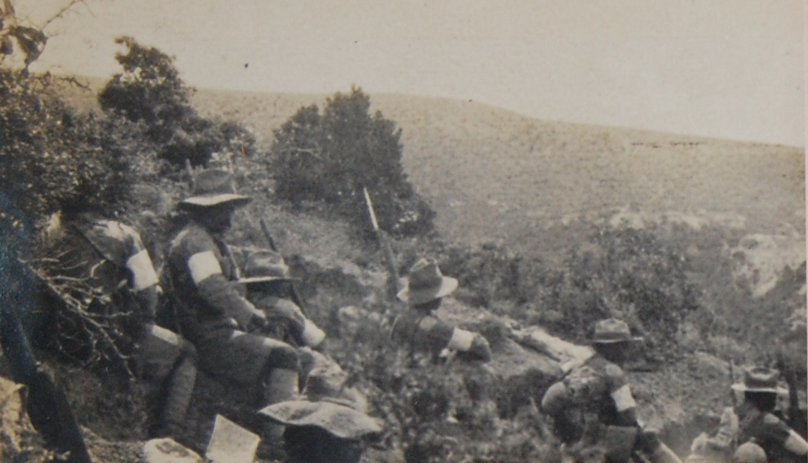 2/10 Gurkhas, Sari Bair